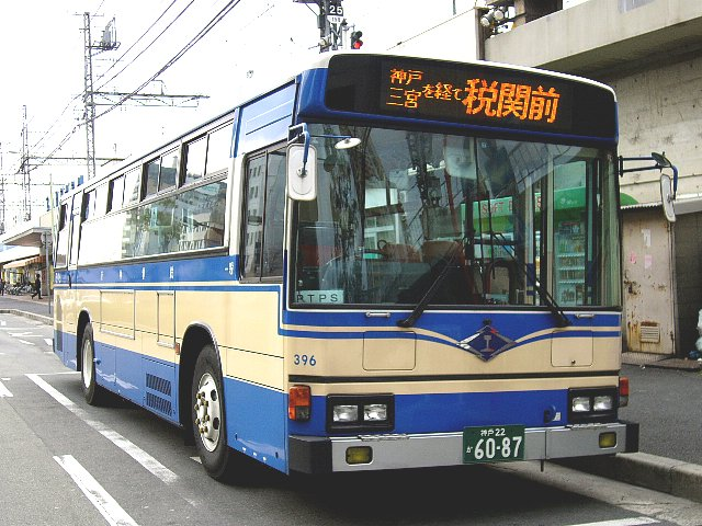 阪神電鉄バス 阪神尼崎にて 正面窓下にあるのが阪神電鉄社紋